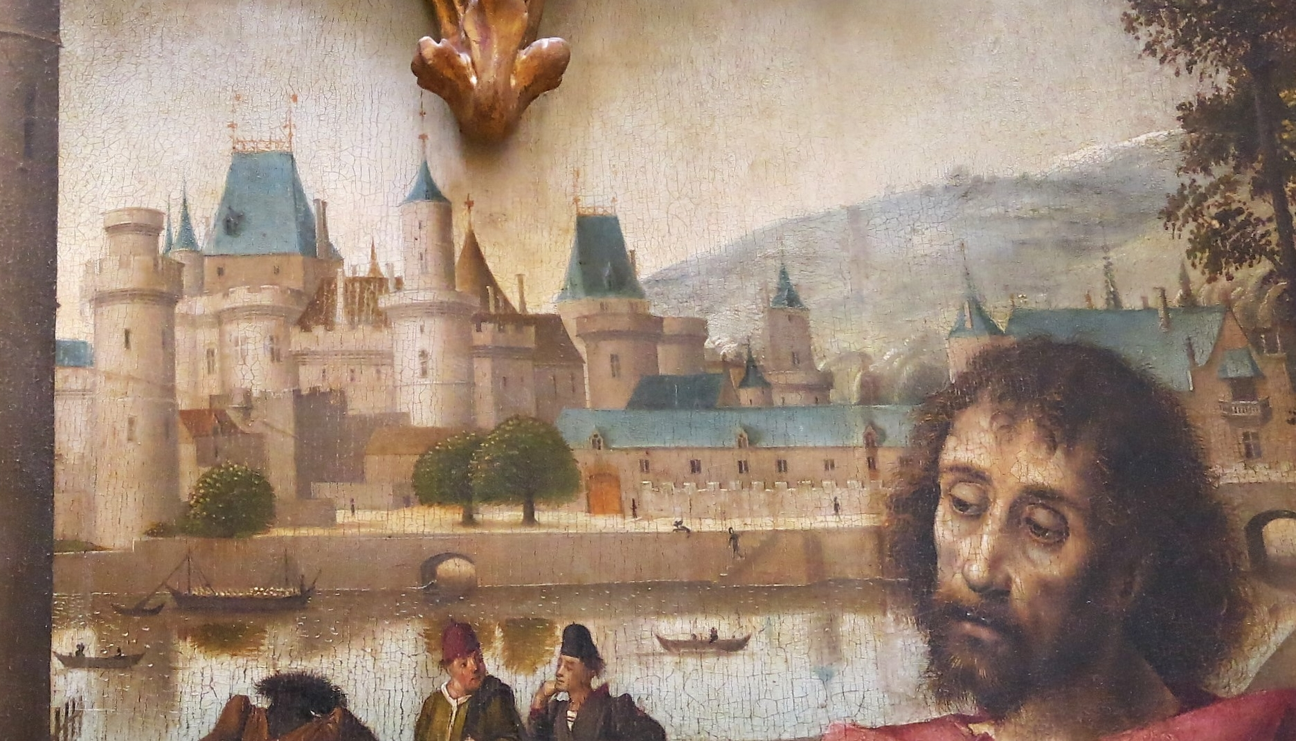 La Crucifixion dite du Parlement de Paris, retable polyptique, détail, vers 1449, huile sur bois de chêne, département des peintures du Musée du Louvre, Paris, France.